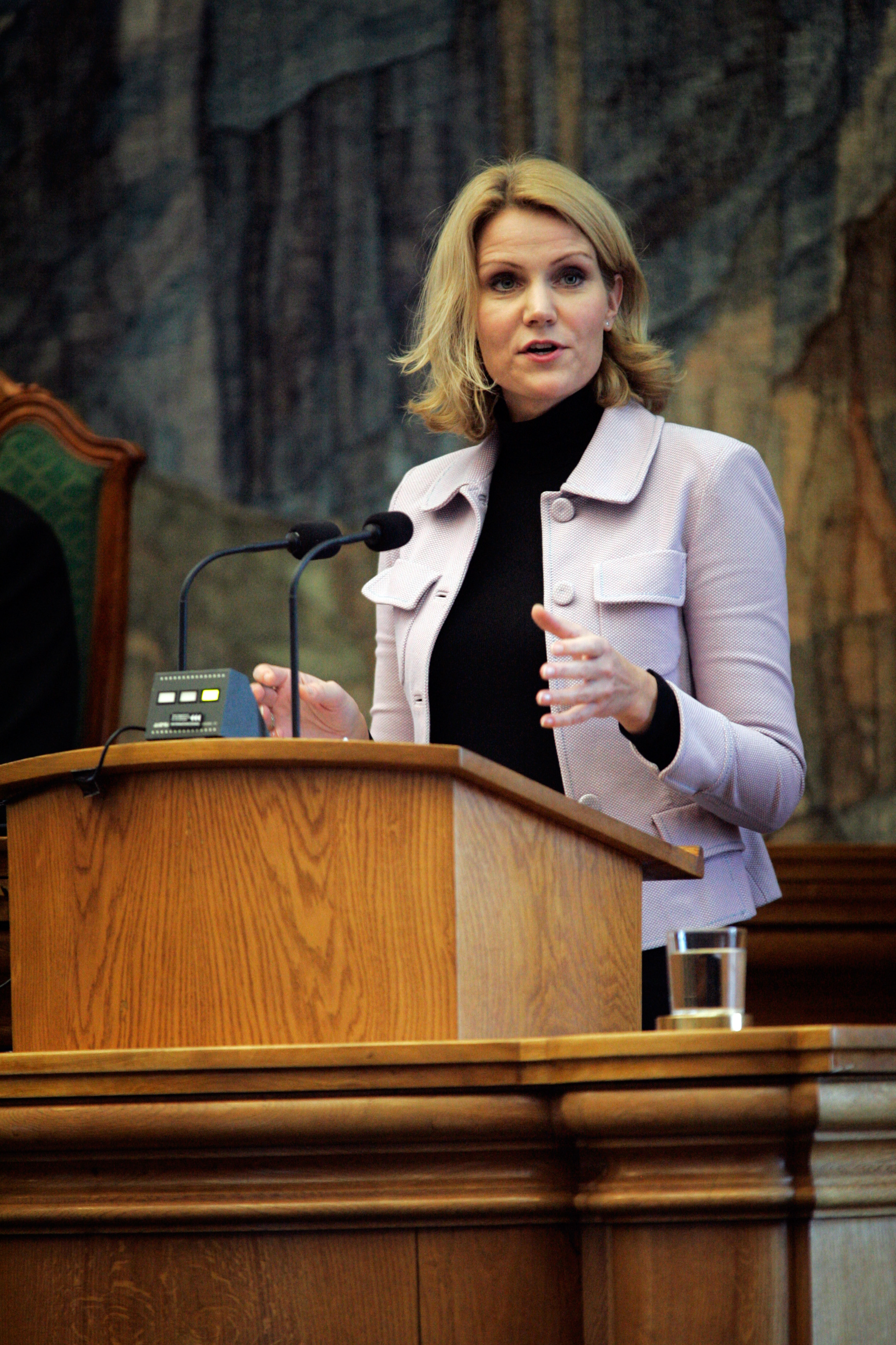 Helle Thorning-Schmidt, partiledare för socialdemokraterna i Danmark, talar under Nordiska rådets session i Köpenhamn 2006.